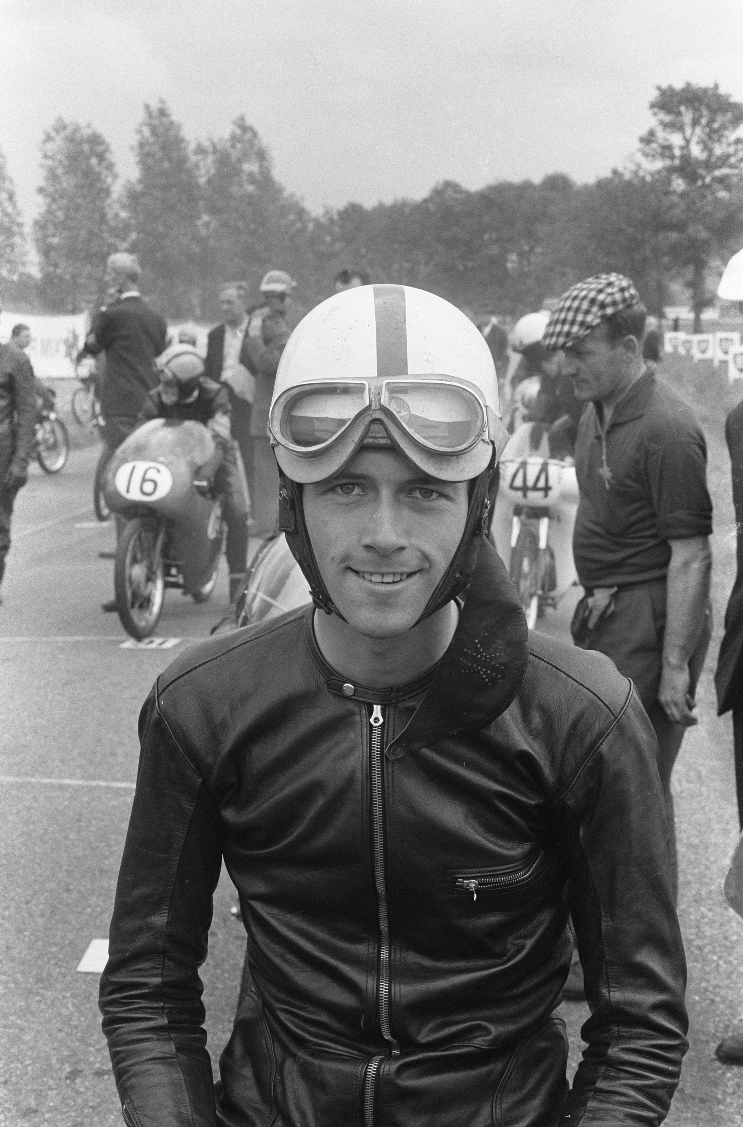 Internationale motorrace circuit Tubbergen. Jan Huberts.